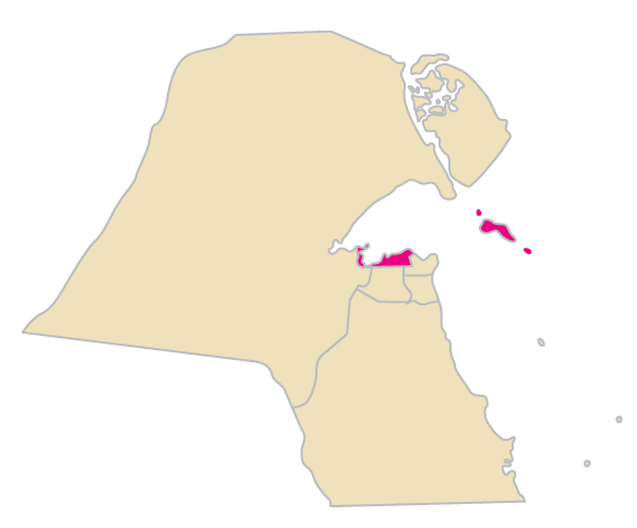 Al Asima